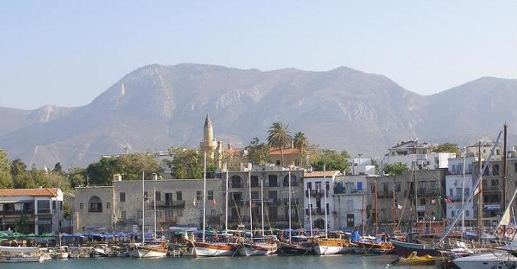 Girne Marina, TRNC